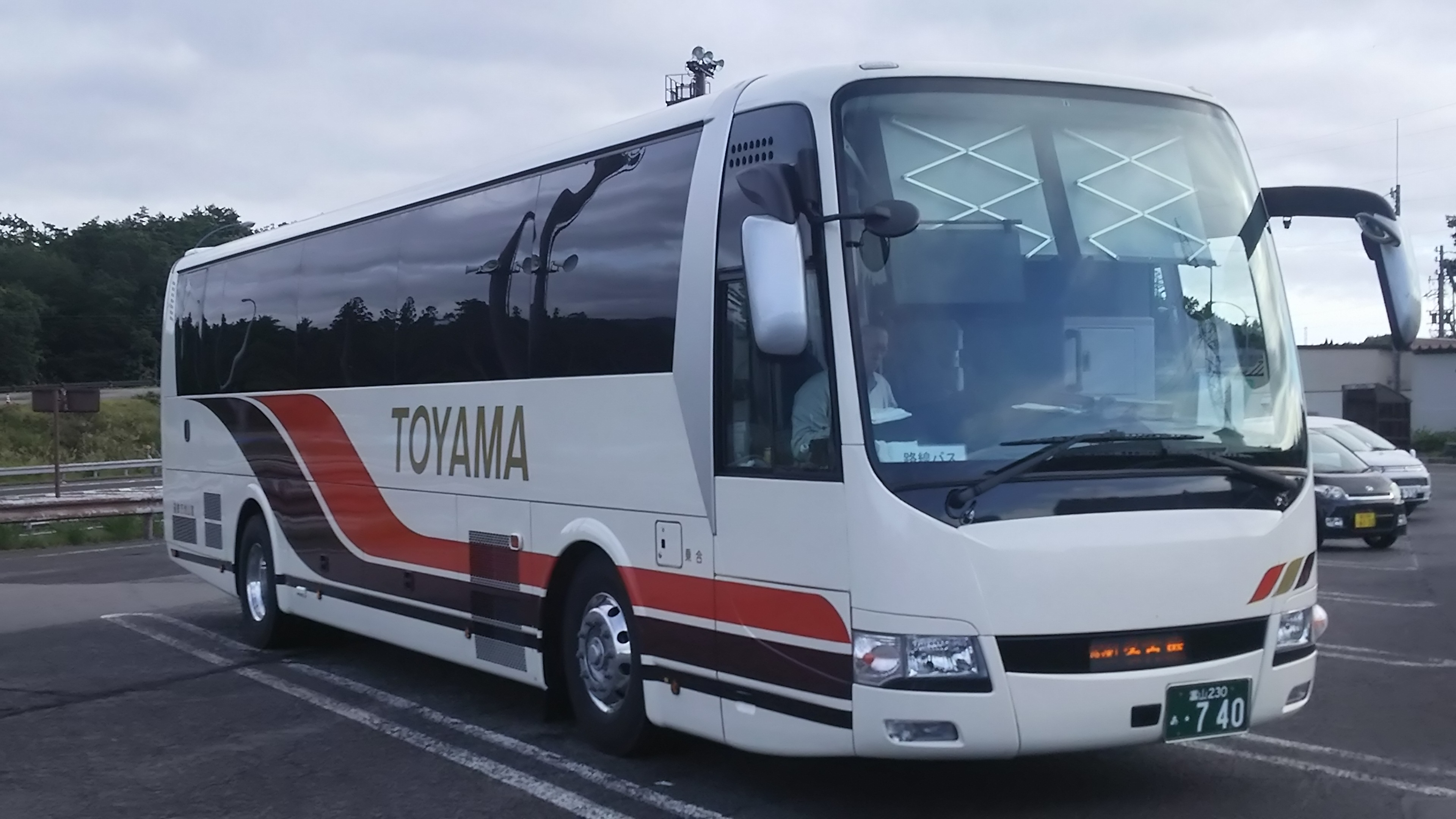 富山～名古屋線で使用される富山地方鉄道の三菱ふそう・エアロエース。